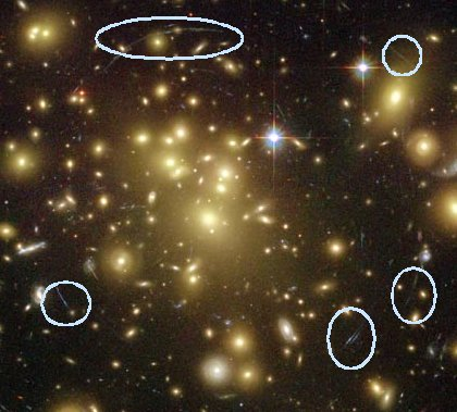 Gravitational Lensing עידוש כבידתי